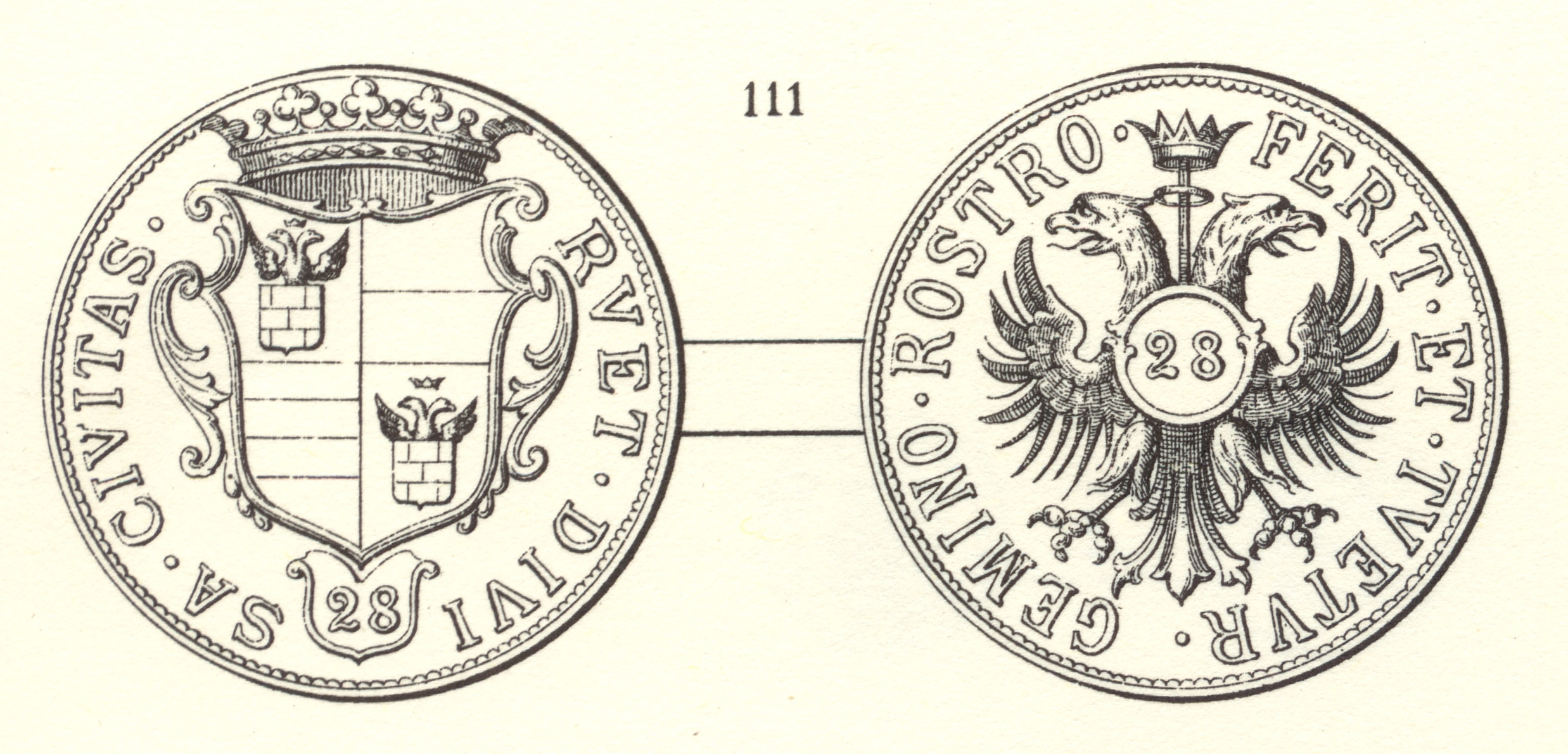 Modena. Francesco I d'Este (1629-1658) AR Tallero Aquilino: D/: RVET • DIVISA • CIVITAS attorno a uno stemma coronato. Nell'esergo 28 R/: GEMINO • ROSTRO • FERIT • ET • TVETVR, intorno ad Aquila bicipite coronata. Nel petto 28